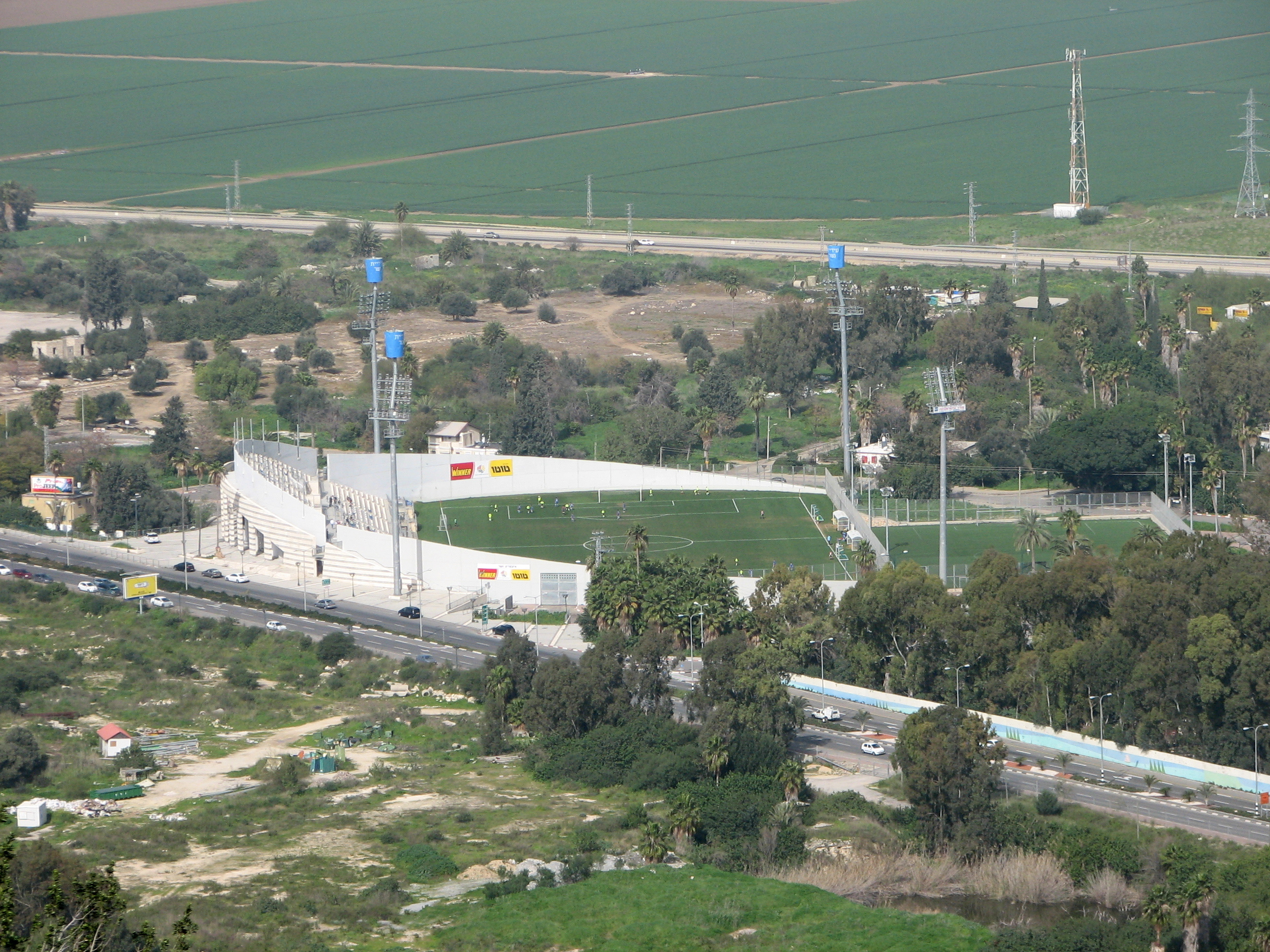 Green Paths, between Nesher - Yagur on Mount Carmel Israel. View from the path השביל הירוק בין העיר נשר וקיבוץ יגור, על הצלע הצפונית של הר הכרמל. מראות על השביל